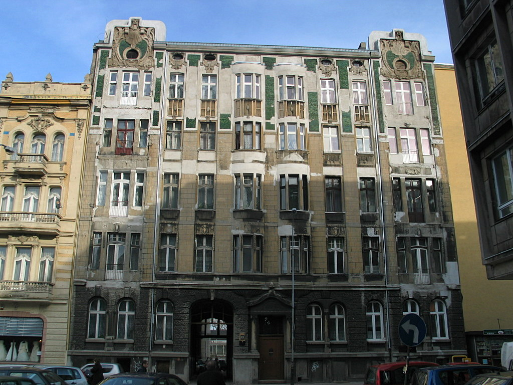 Kamienica Abrahama Dudaka Łódź